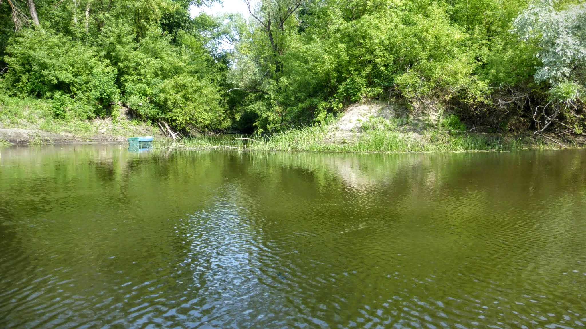 Мокрая Панда